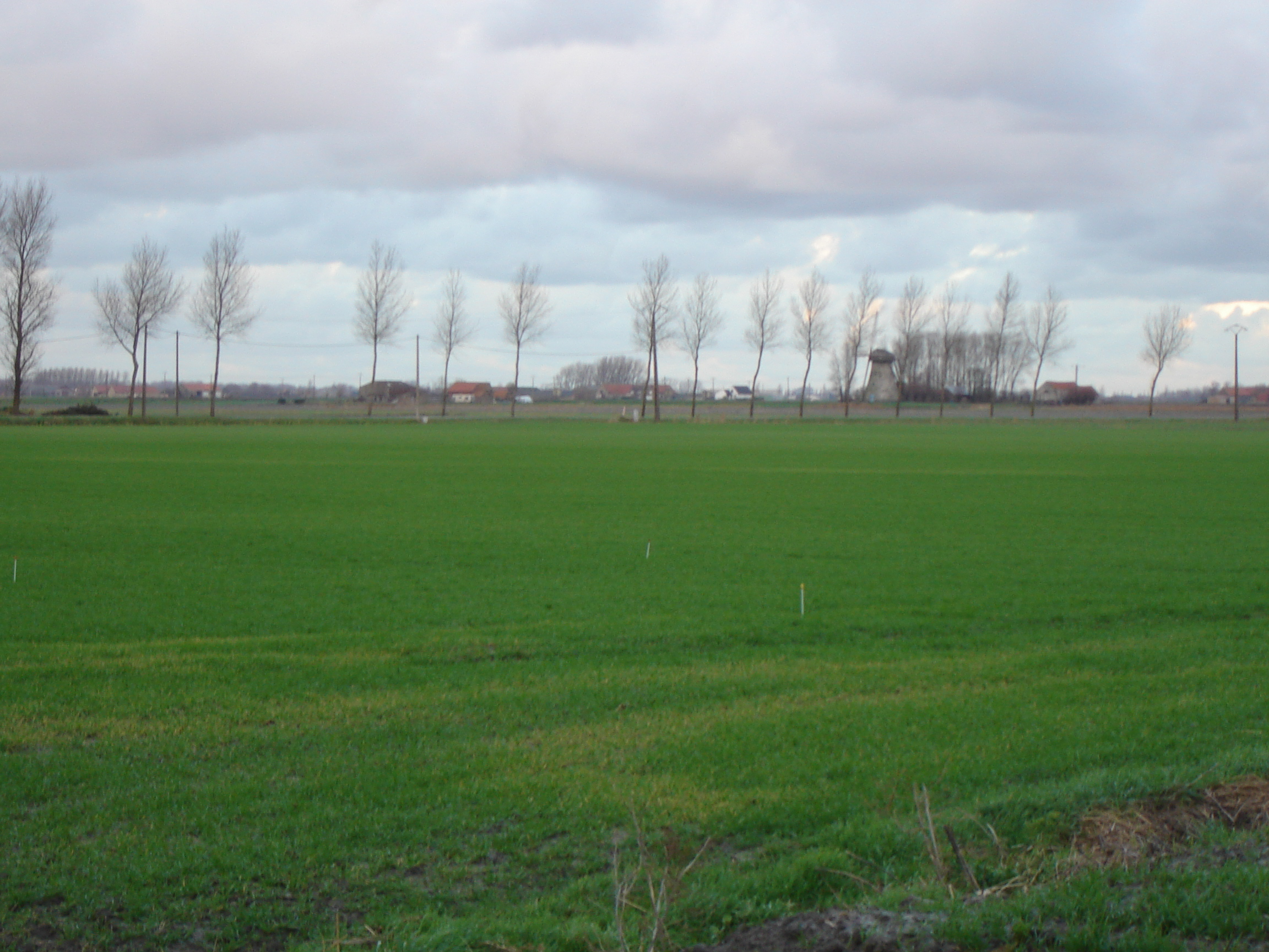 Landschap van De Moeren in Veurne. Landscape of De Moeren, Veurne , West-Flanders, Belgium. Sint-Karelsmolen windmill in the background.